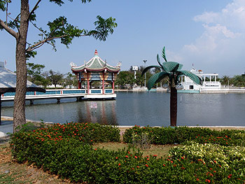 สวนตำหนักน้ำ เทศบาลเมืองชลบุรี